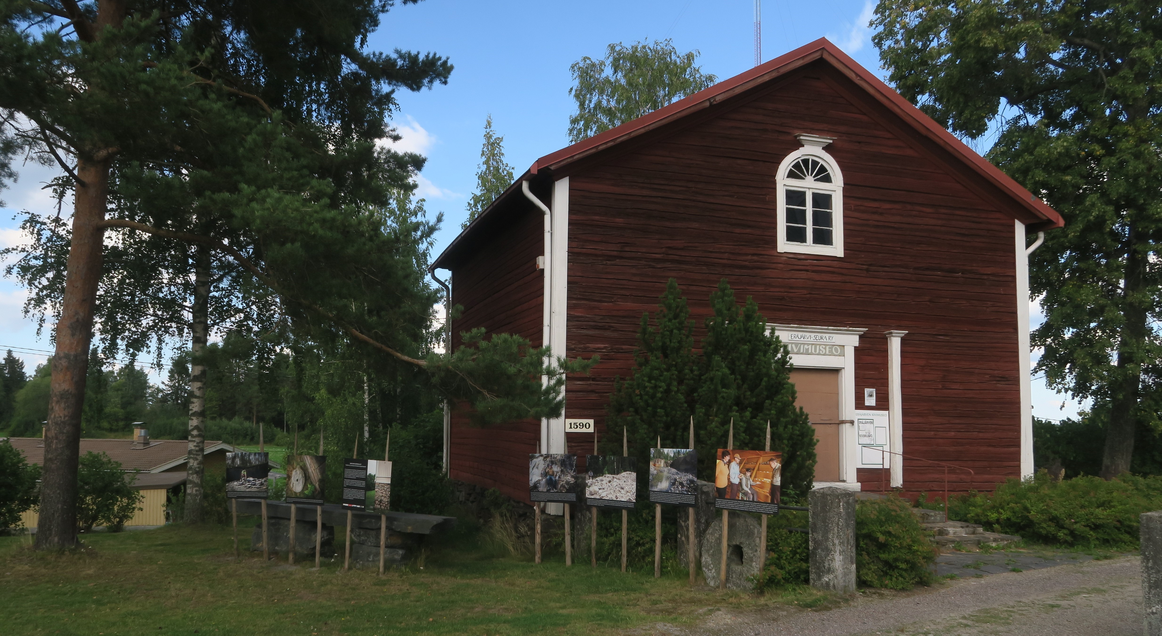 Eräveden kivimuseo Eräjärvellä Orivedellä elokuussa 2020. Museo toimii entisessä Lainajyvämakasiinissa Eräjärven kirkon luona.